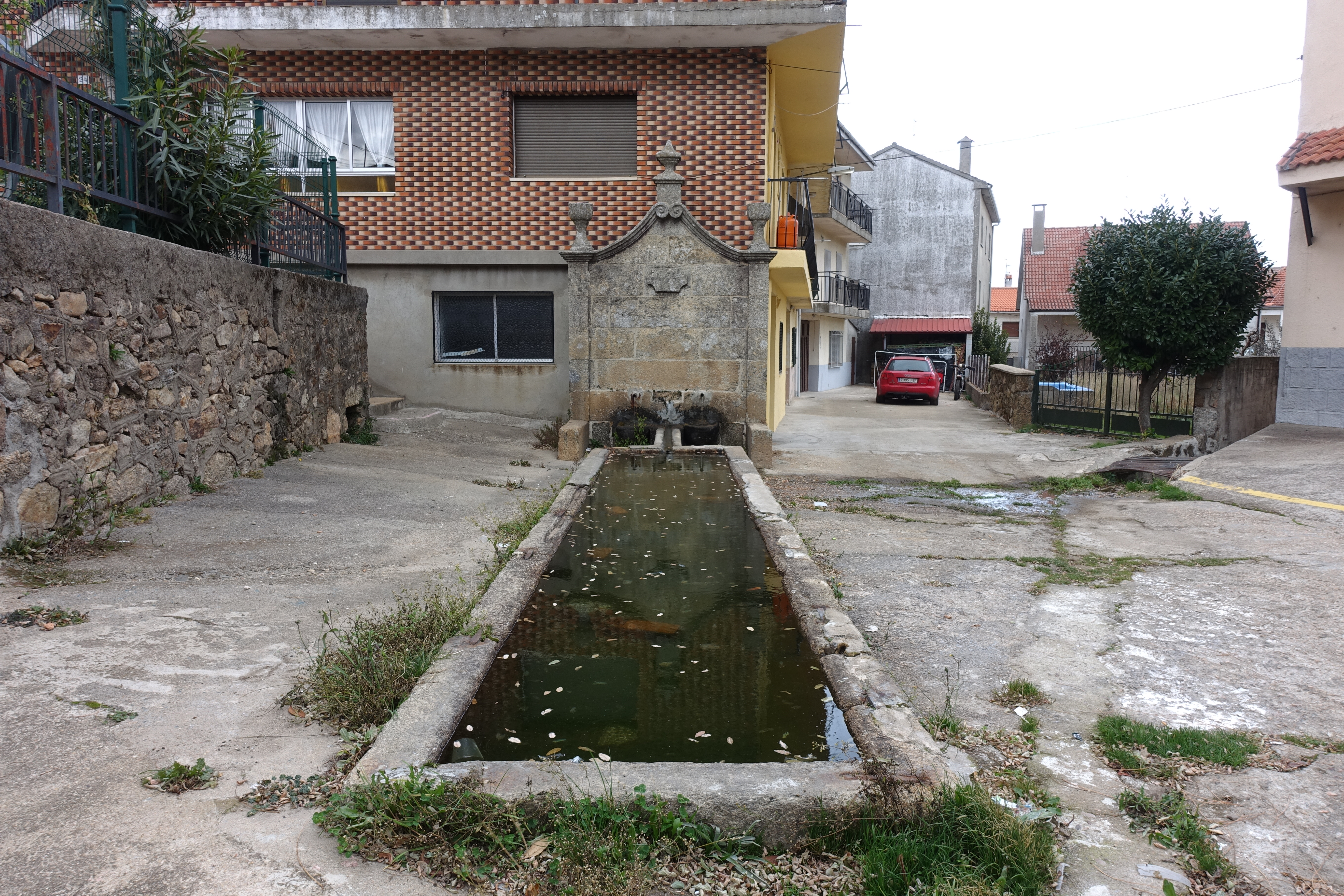 Fuente en El Payo (Salamanca, España).